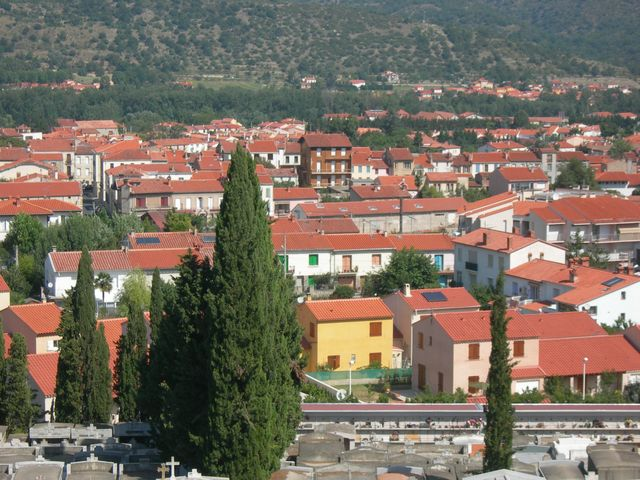 tuiles de prades